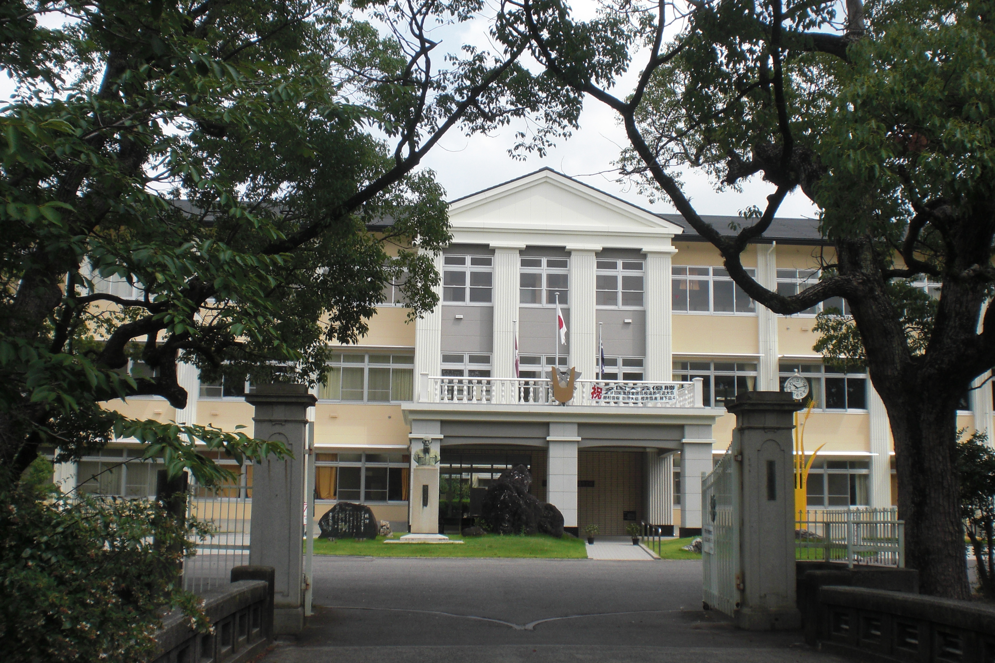 安城農林高等学校の新本館と正門